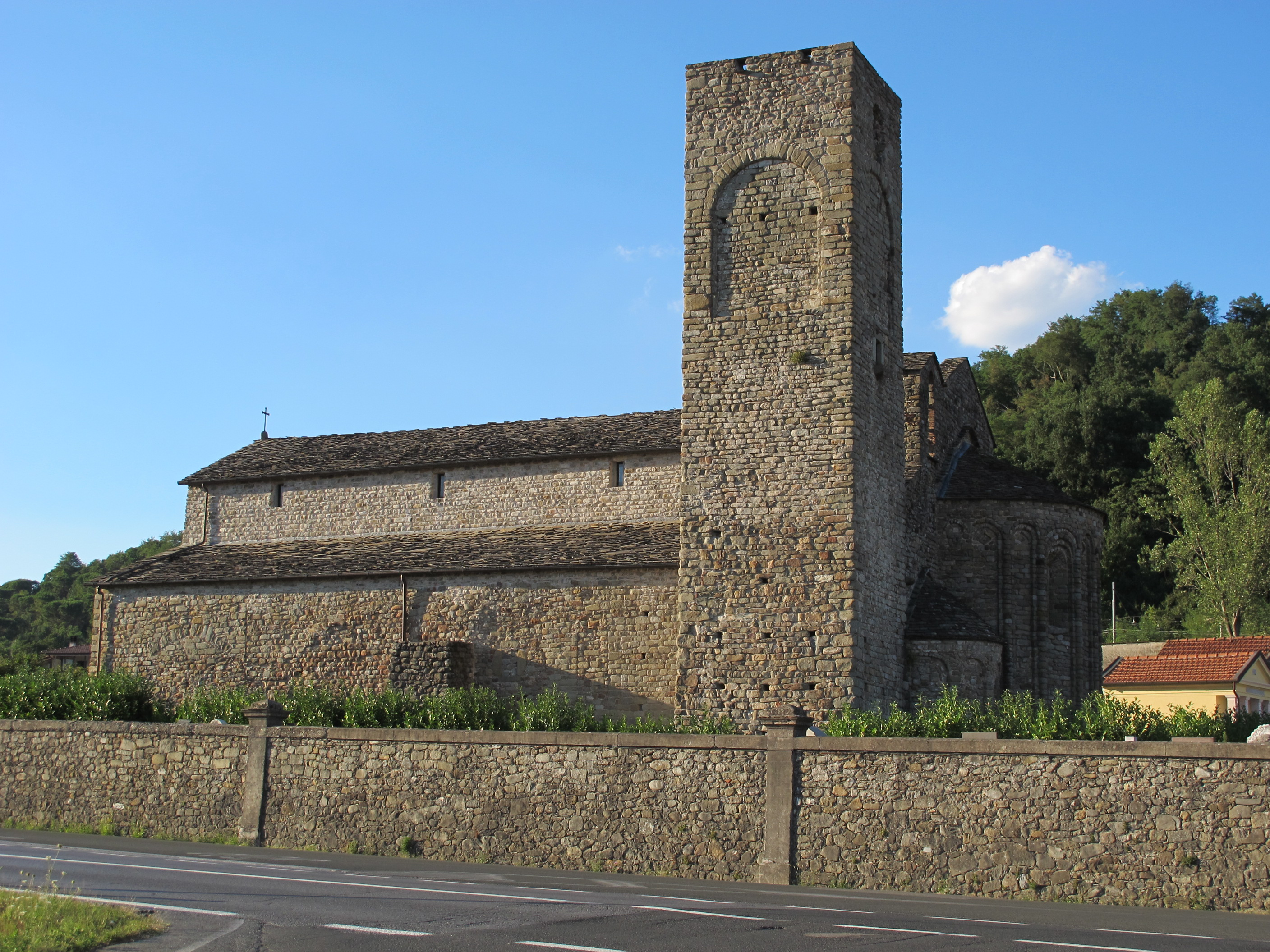 Pieve di sorano